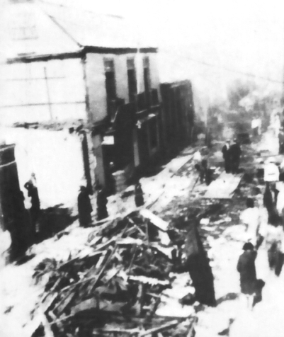 Fotografía que muestra un ejemplo del vandalismo chileno desatado en Tacna, ciudad peruana bajo ocupación de Chile, hacia 1926.